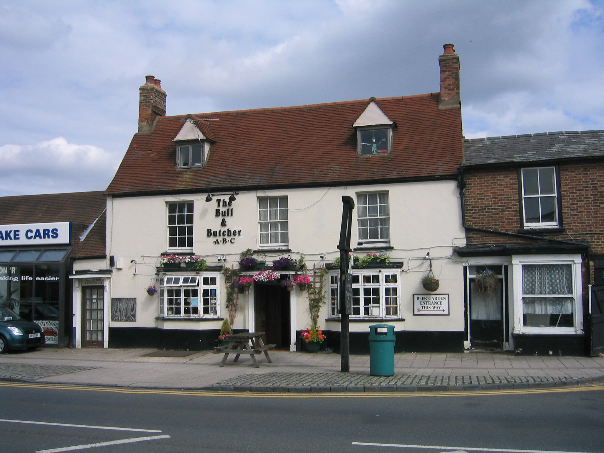 Deben Dave (talk) 21:23, 4 September 2008 (UTC)